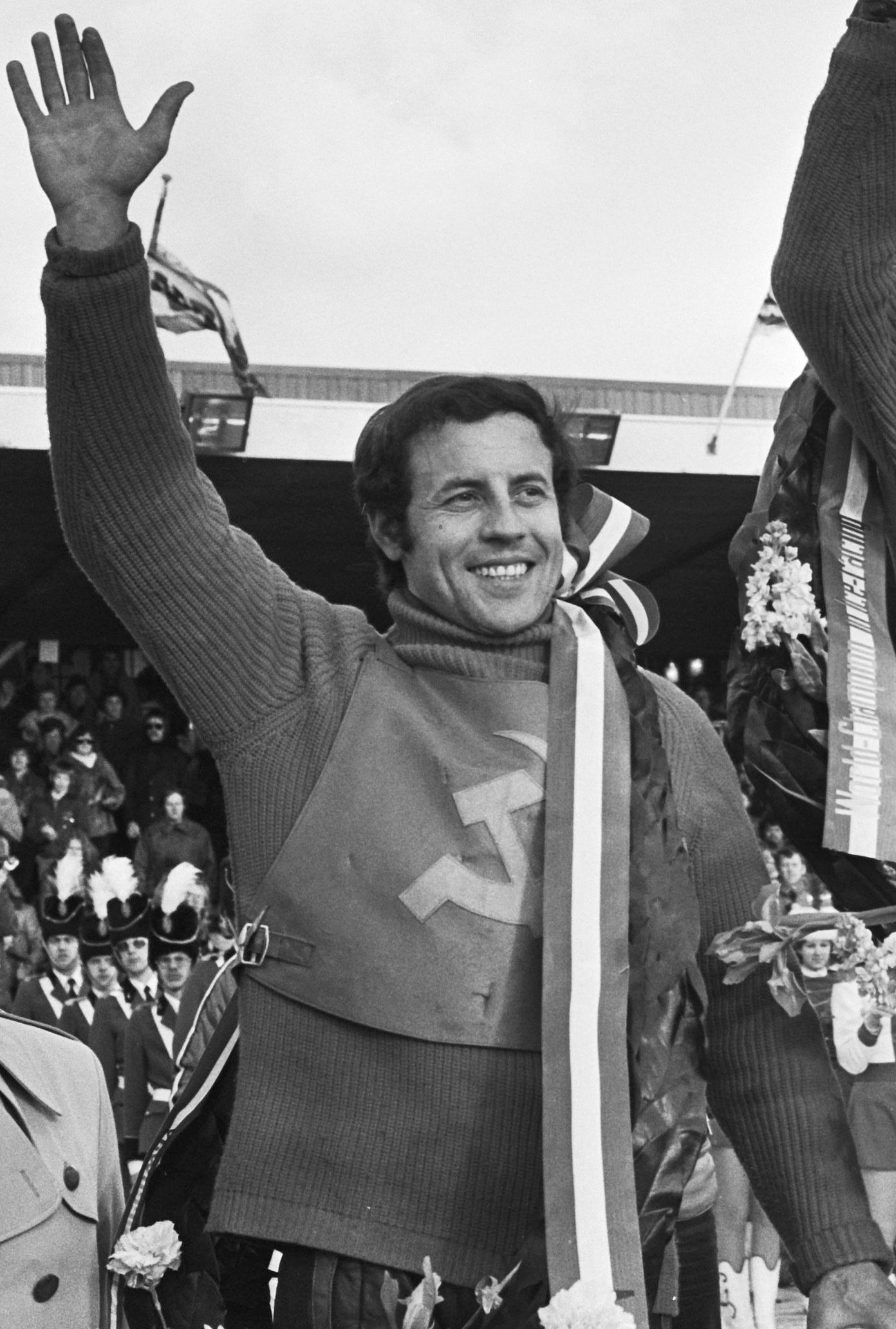 Finale ijsspeedway in Assen; de Rus Tarabensko tijdens huldiging